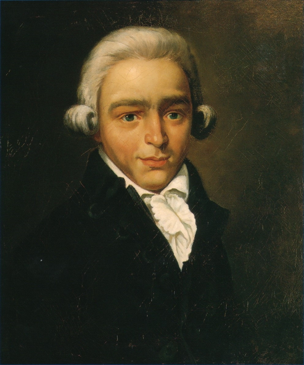 Schilderij uit de 18e eeuw van A, de Lelie dat hangt in het stadhuis van Haarlem. Foto gereproduceerd voor Wikipedia met toestemming van uitgeverij de Bataafse Leeuw en auteur P. N. Helsloot.